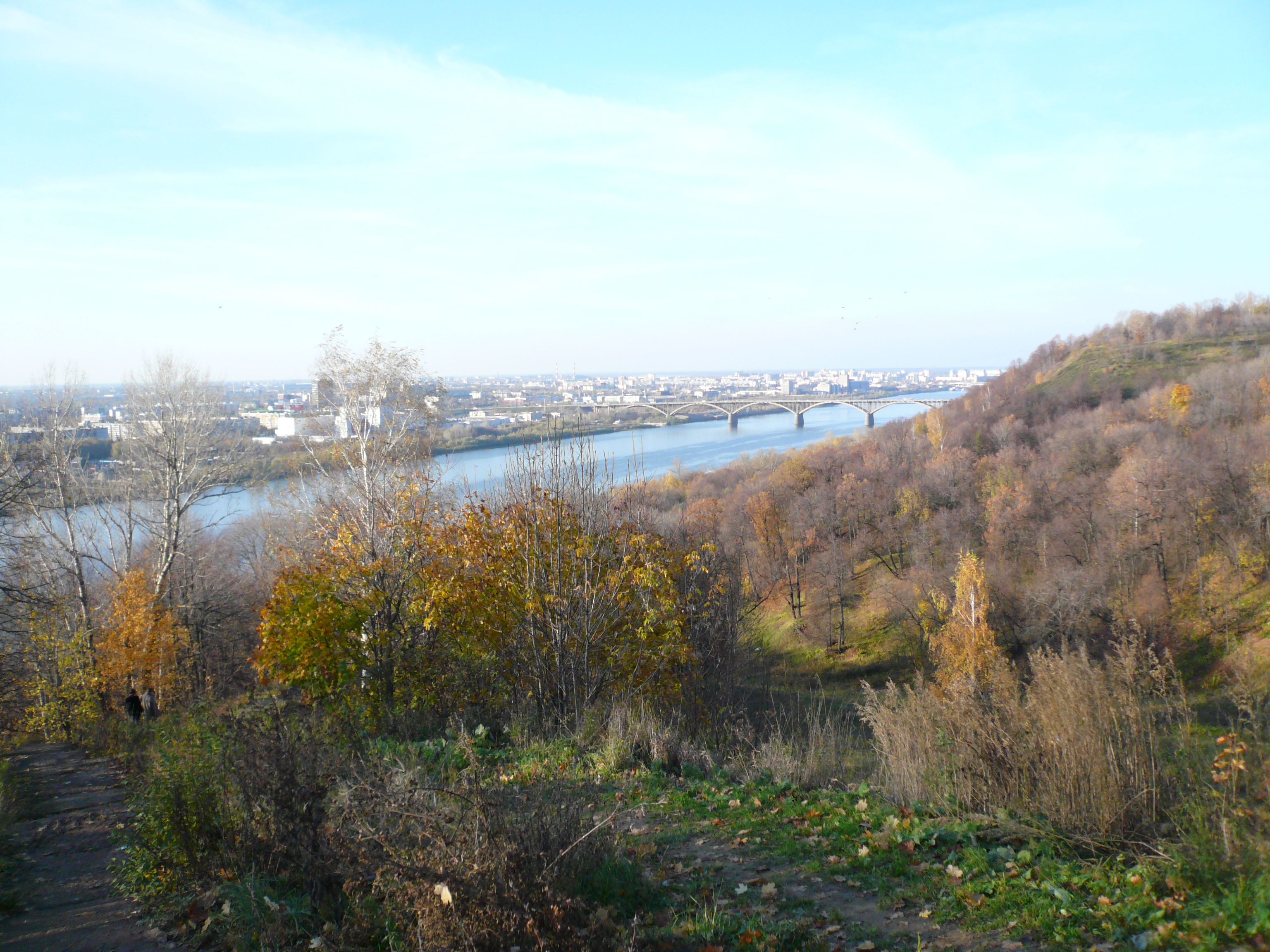 Парк «Швейцария» (Нижегородская область, Нижний Новгород, парк "Швейцария" (Приокский р-н))